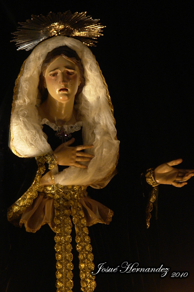 Nuestra Señora de los Dolores, 1798 José Luján Pérez Parroquia Matriz de Ntra. Sra. de la Concepción.